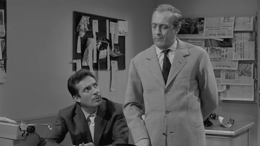 Screenshot dal film Le olimpiadi dei mariti (1960) di Giorgio Bianchi